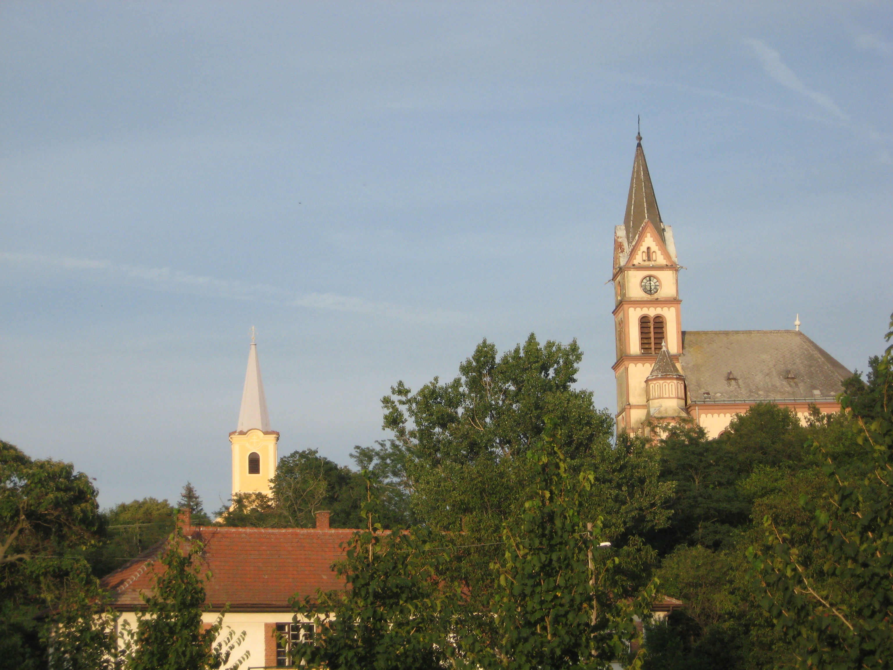 Ostffyasszonyfai római katolikus és evangélikus templom, Vas megye